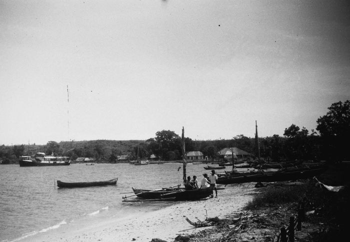 negatief. De "Taliwang" ter hoogte van de steiger in Namlea